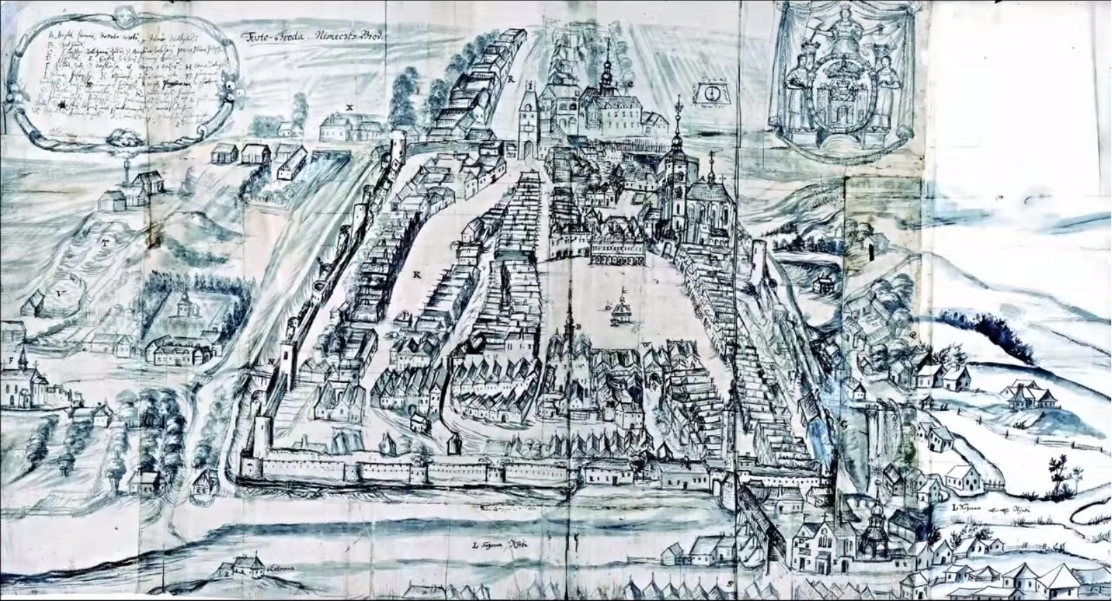 Nejstarší známé vyobrazení Havlíčkova Brodu (kol. 1690). Informace najdeme v knize Baroko na Havlíčkobrodsku str.168 -171 pod názvem díla Pohled na Německý Brod od jihovýchodu. Kresba Jan František Beckovský. Kresba tuší na papír 57 x 104 cm.